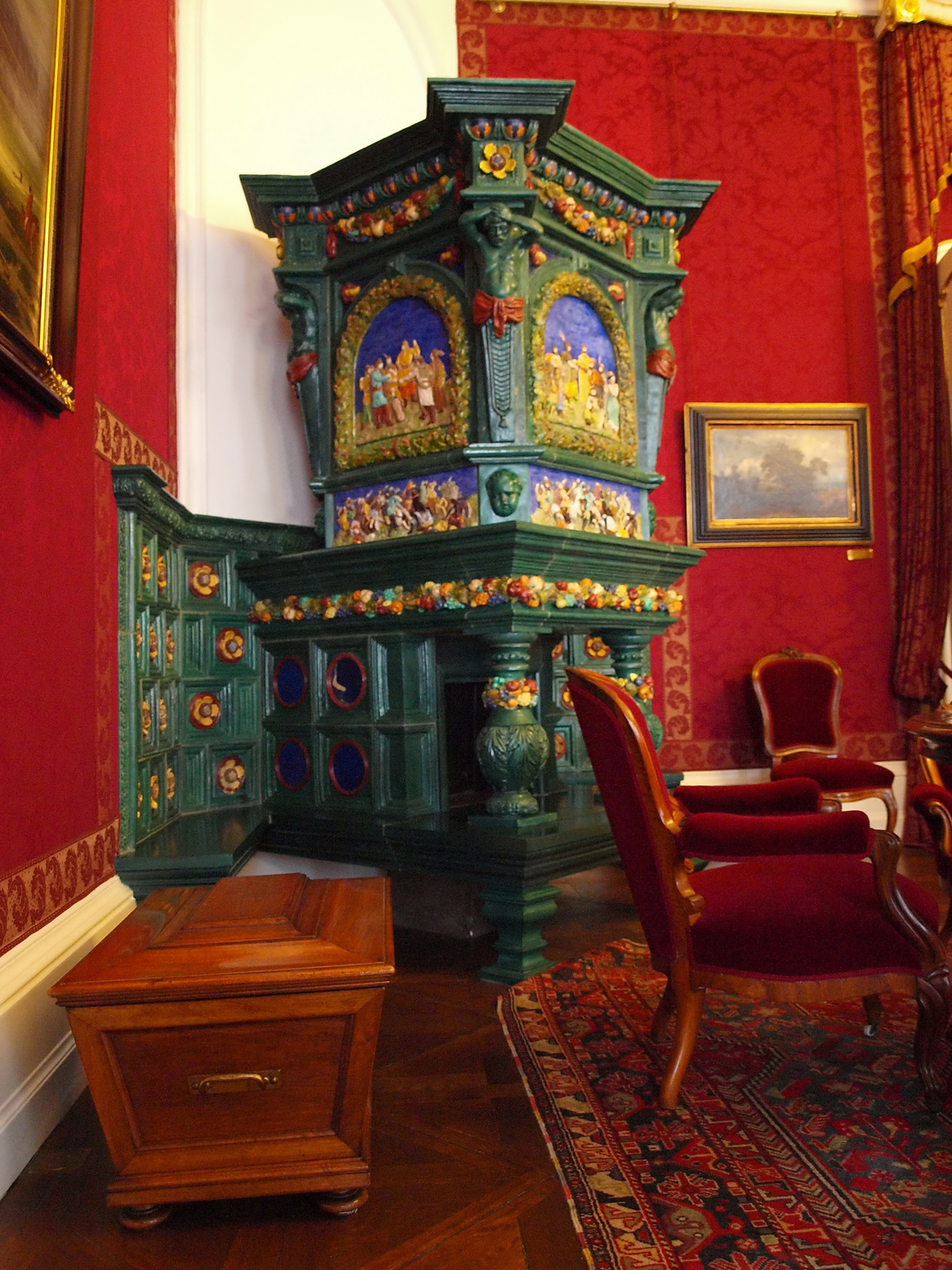 Grassalkovich-kastély (Gödöllő, Martinovics utca 16.) This is a photo of a monument in Hungary, Identifier: 7051